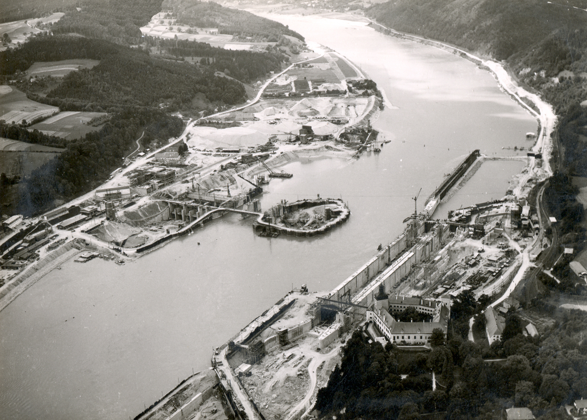 Luftbildaufnahme während der Errichtung des Donaukraftwerks Ybbs-Persenbeug